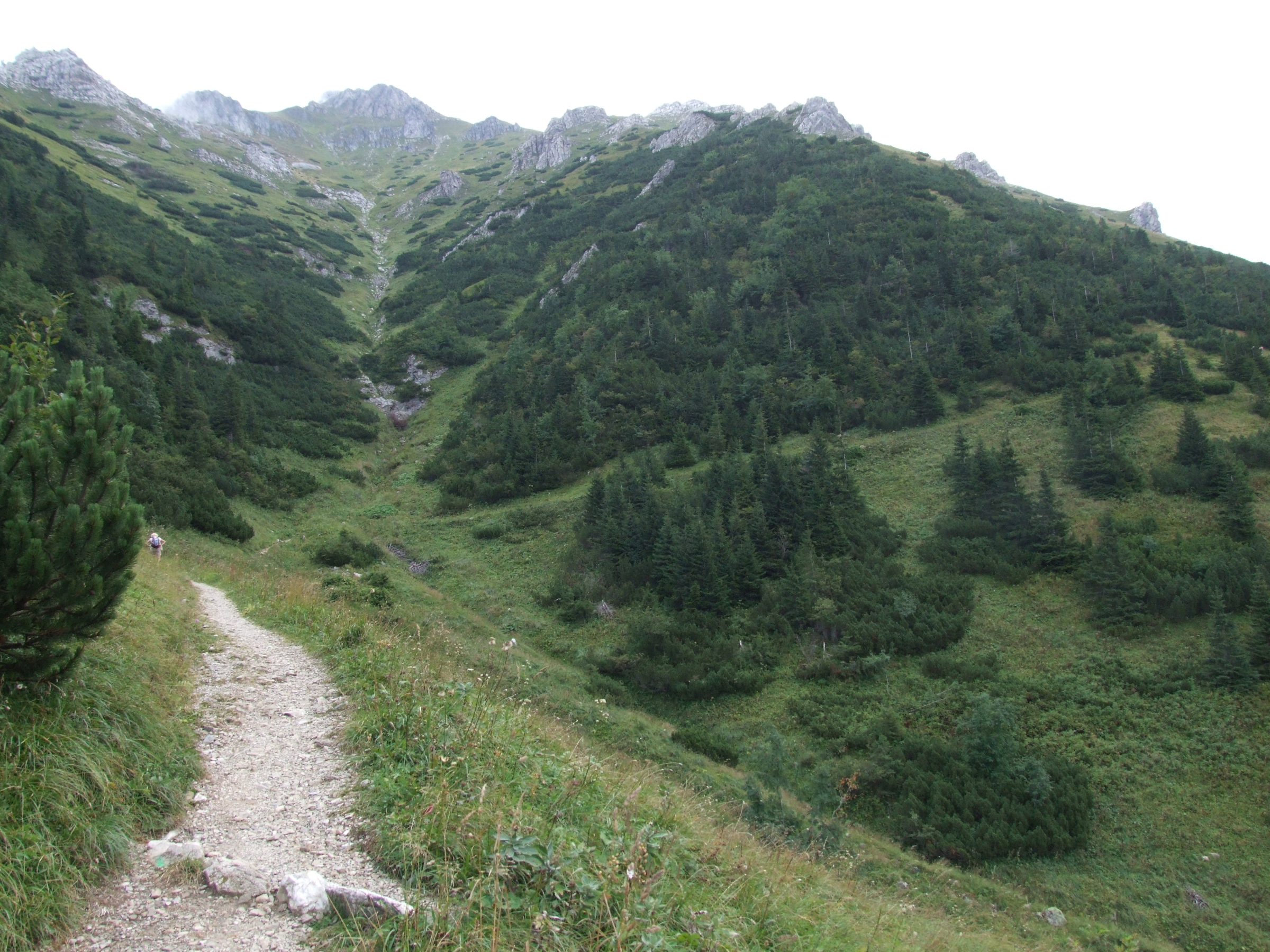 Głupi Żleb w Zadnich Koperszadach